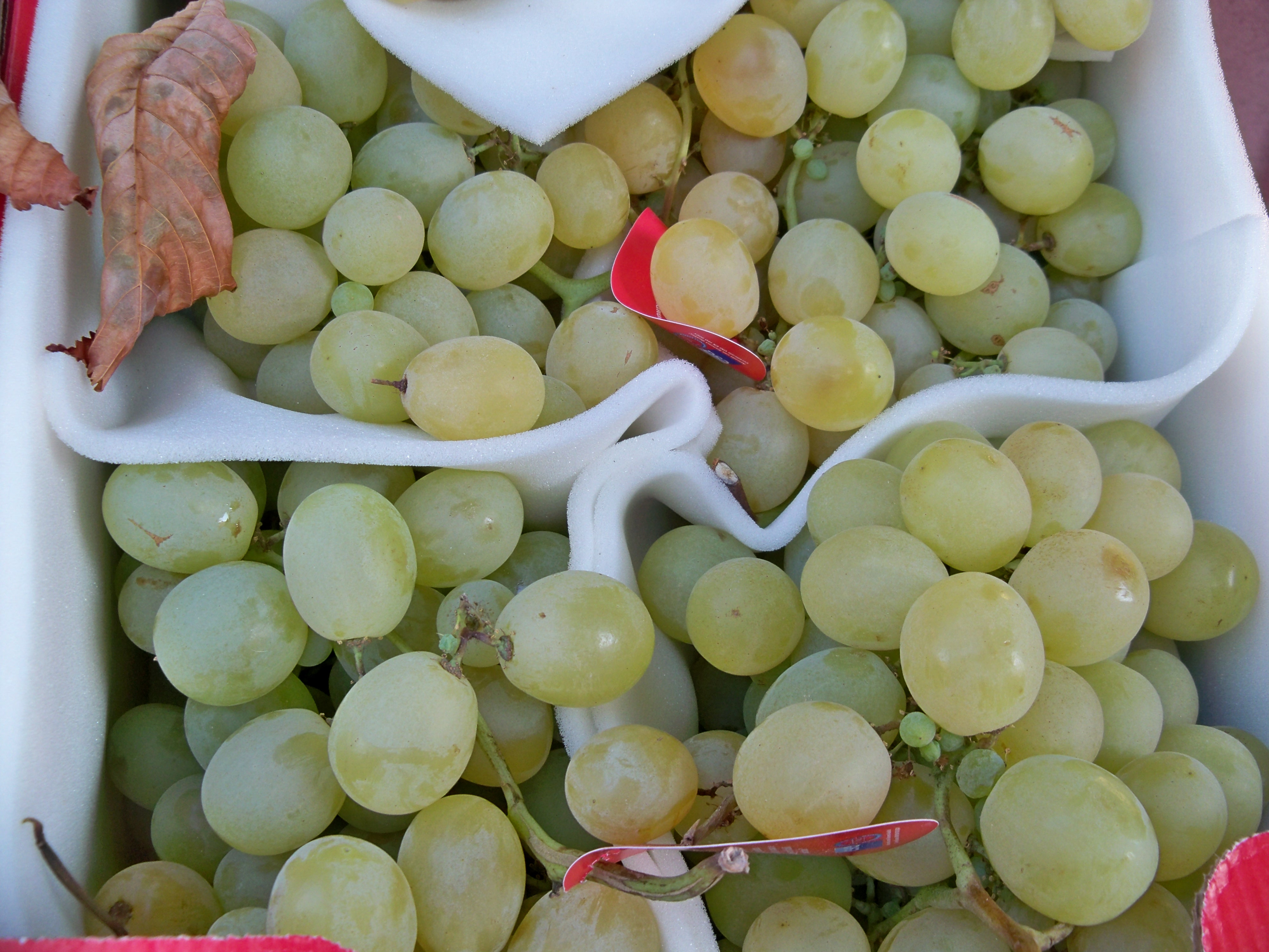 raisin variété Italia